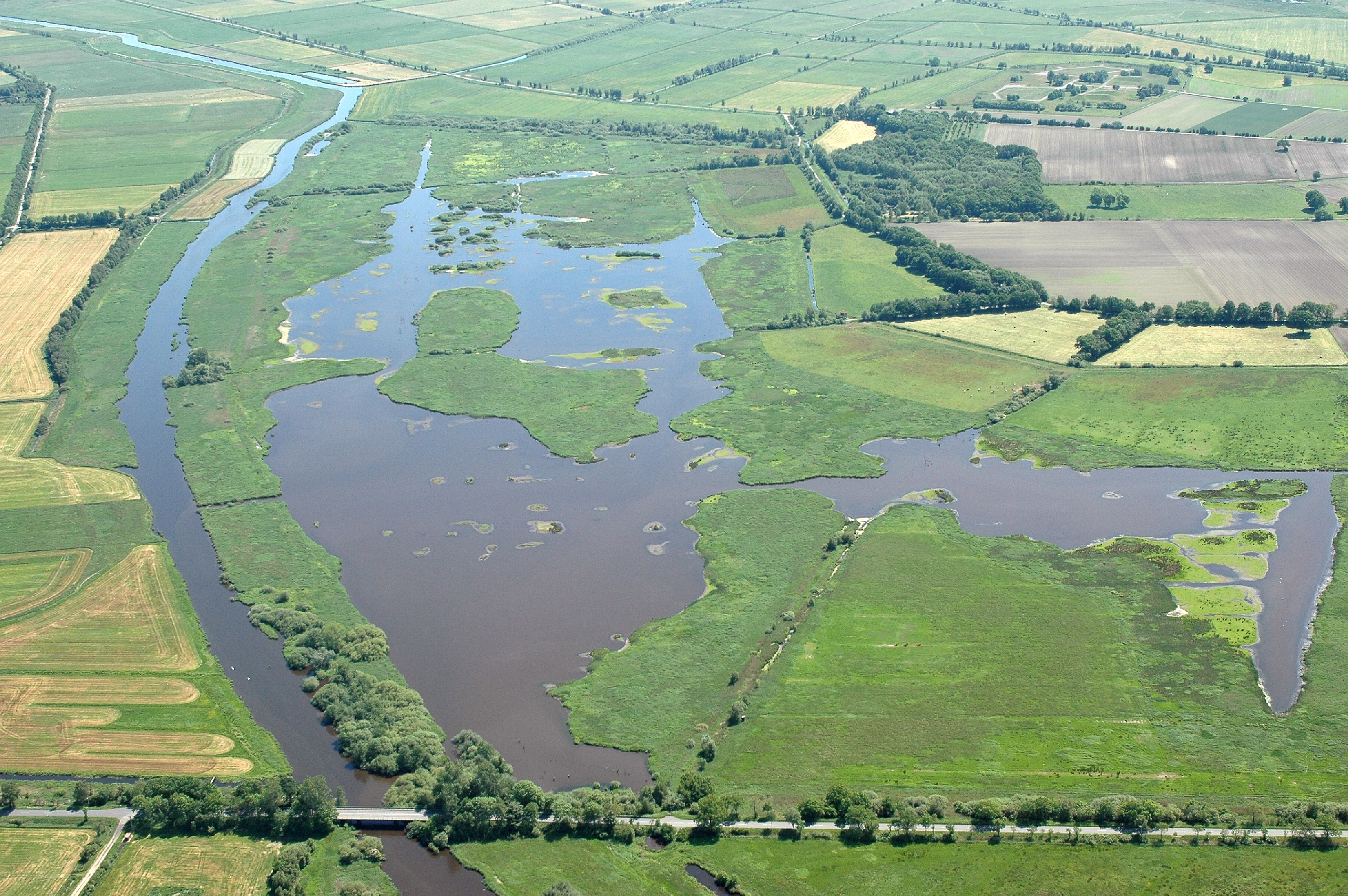 Polder Bramel Fotoflug vom Flugplatz Nordholz-Spieka über Cuxhaven und Wilhelmshaven